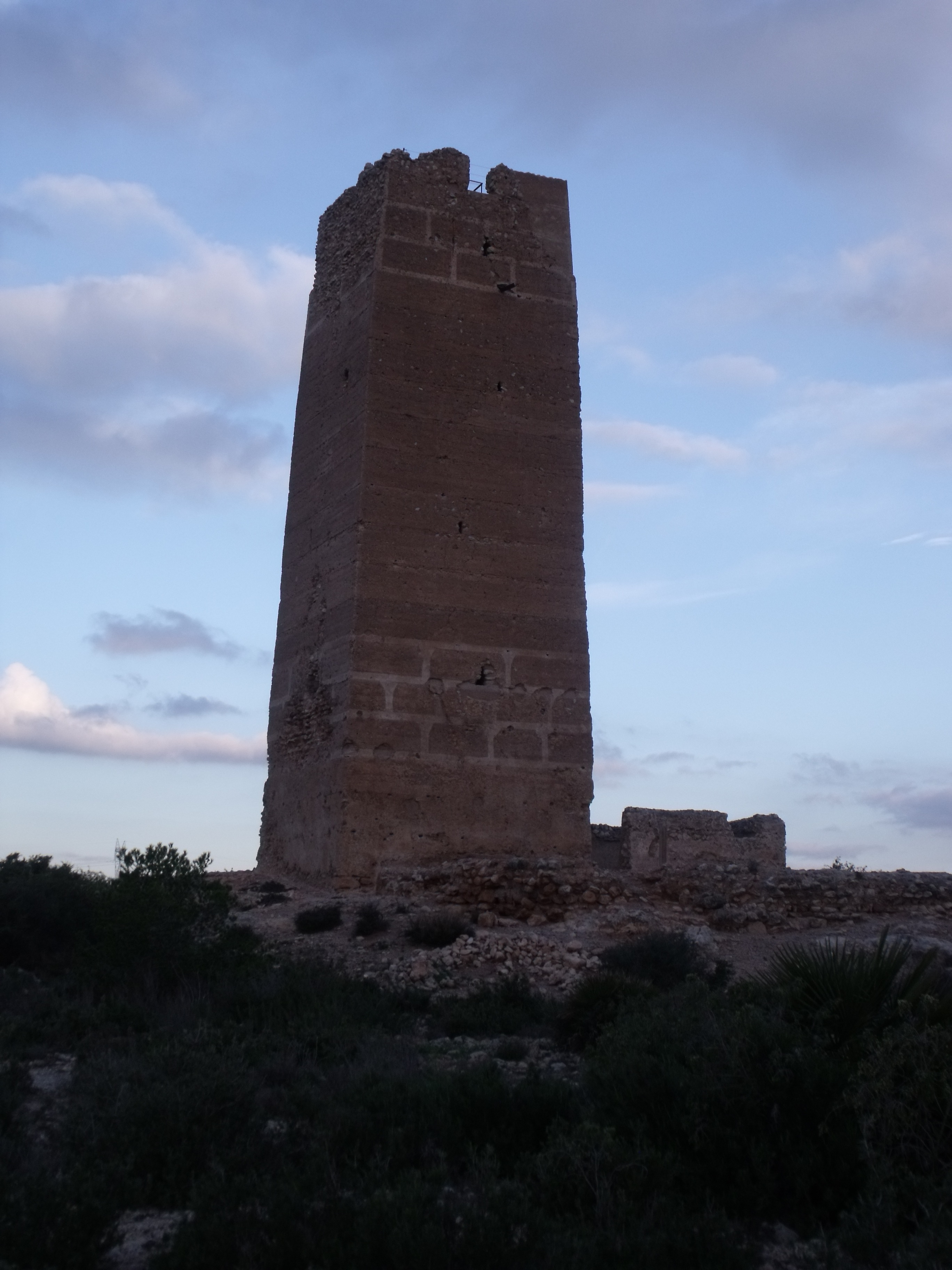 Torre Bofilla, Bétera, España.